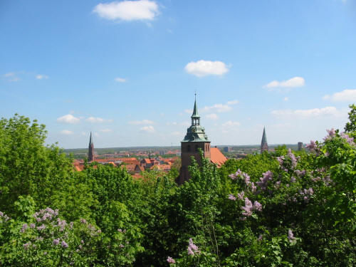 Lüneburg vom Kalkberg